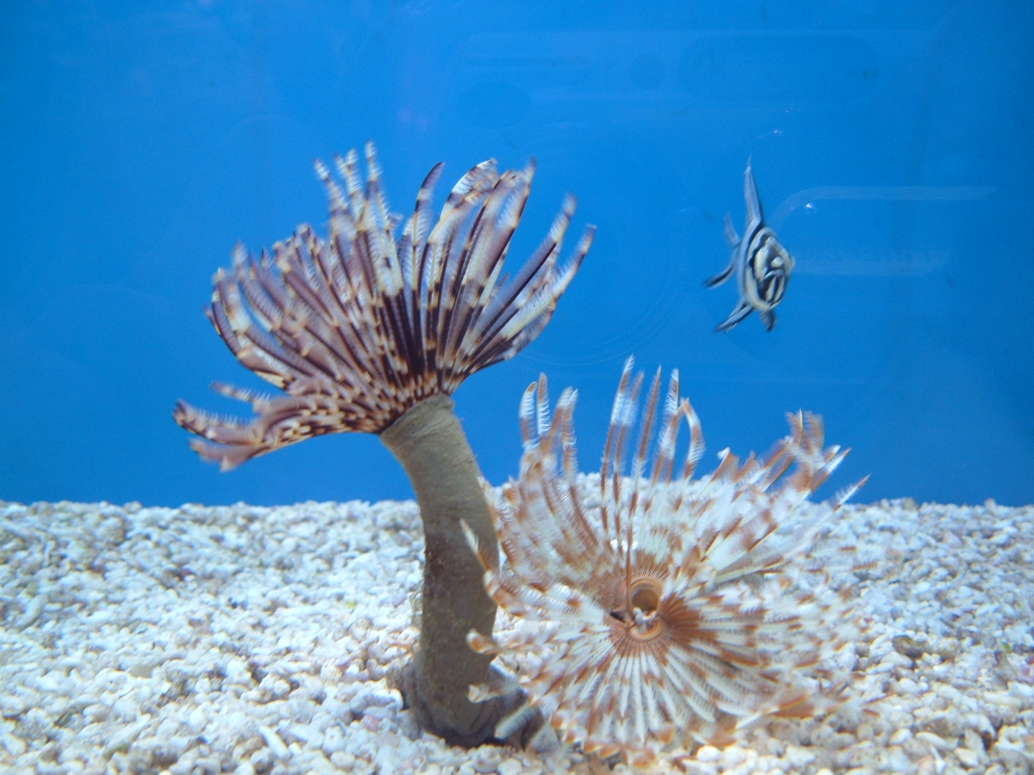 Ecsetférgek (Budapest)